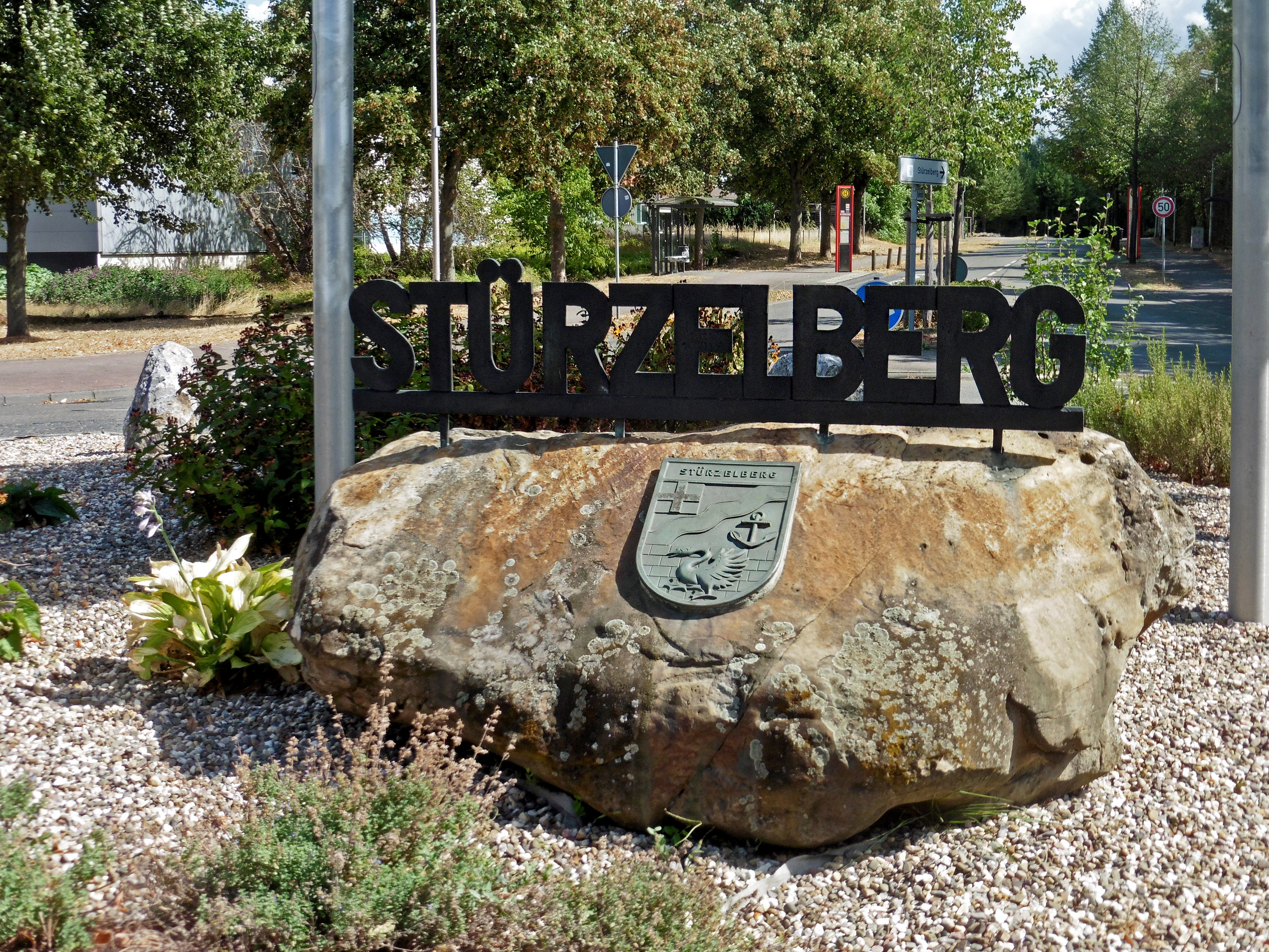 Kreisel in der Bahnstraße beim Stürzelberg Center in Stürzelberg bei Dormagen. Ansicht von Südwesten.